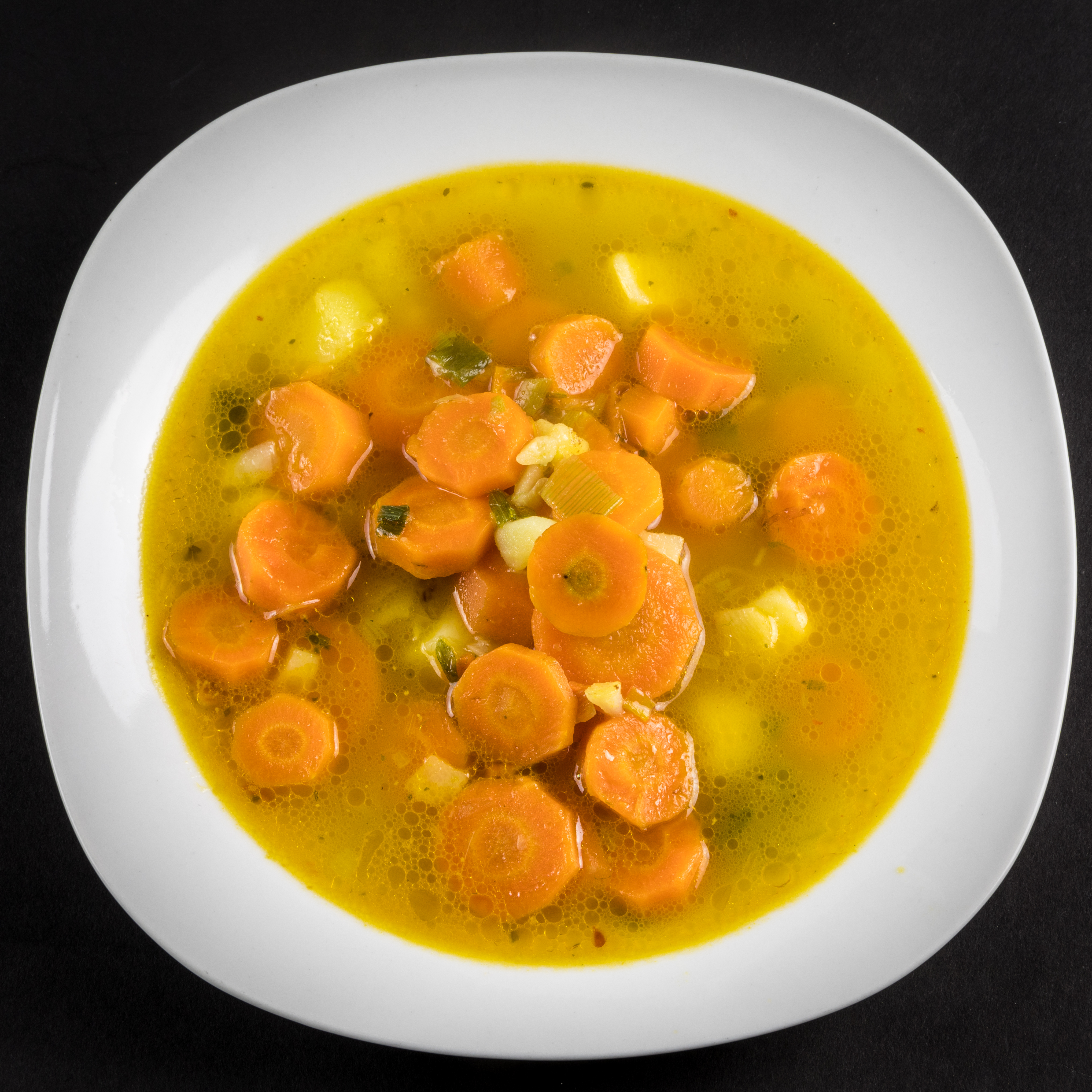 Möhrensuppe/Karottensuppe auf weißem Teller